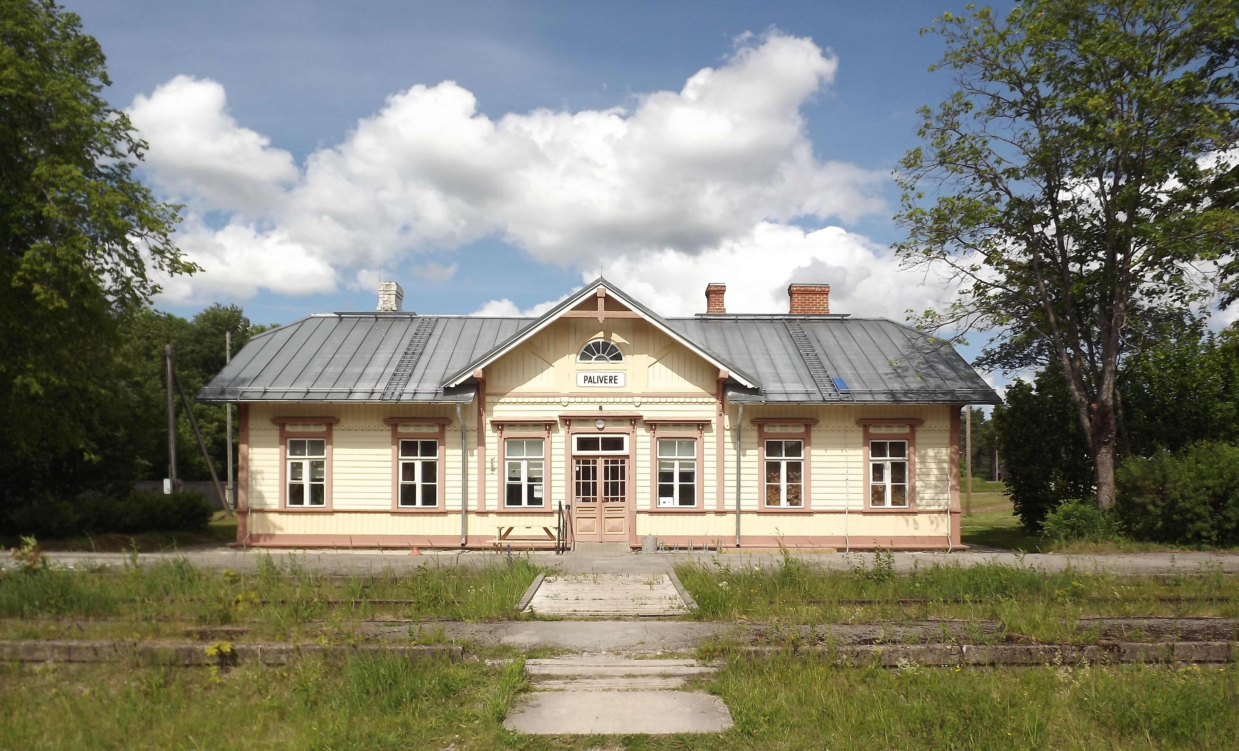 Palivere jaamahoone.